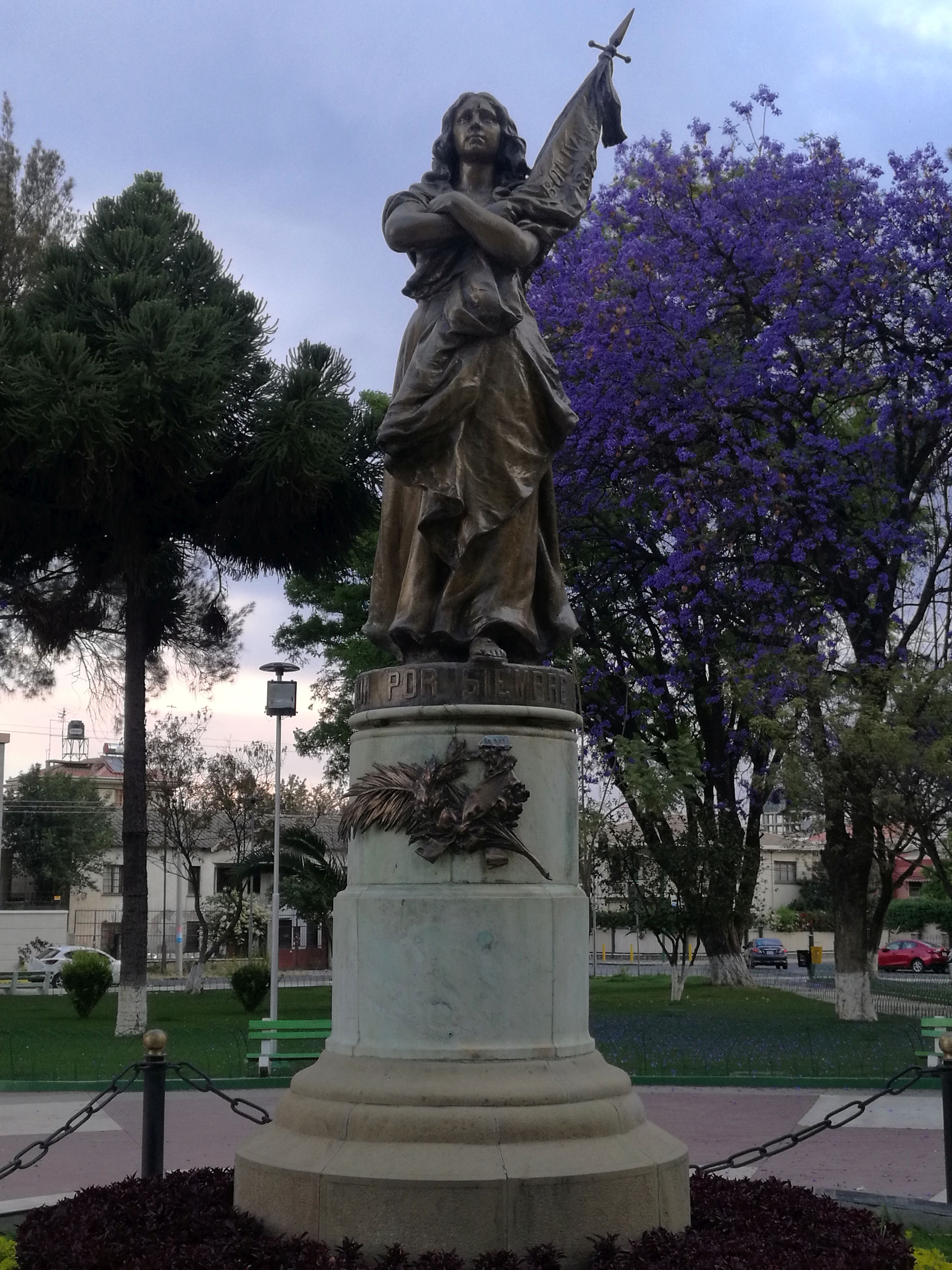 Genoveva Ríos This medium shows the protected monument with the number C/00-362 in Bolivia.